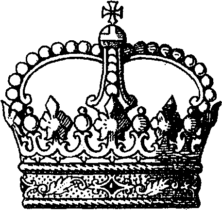 "Fig. 7. Landgrafenkrone. [Krone der Prinzen aus großherzoglichen Häusern, der Herzoge, der Herzoge in Bayern und von Württemberg.] Stirnreif mit fünf Blatt- und vier Perlzinken, überspannt von vier Kronenbügeln."